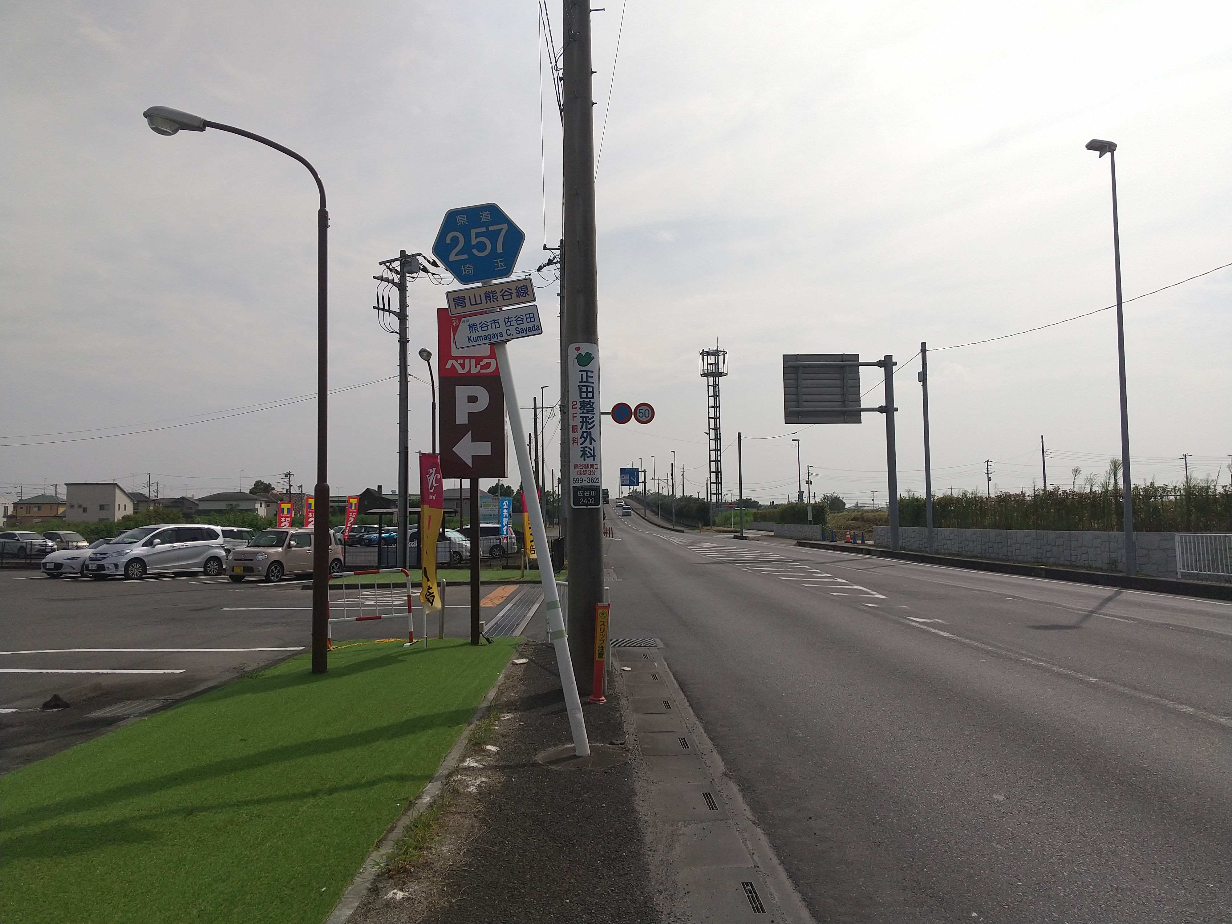 熊谷市佐谷田付近にて